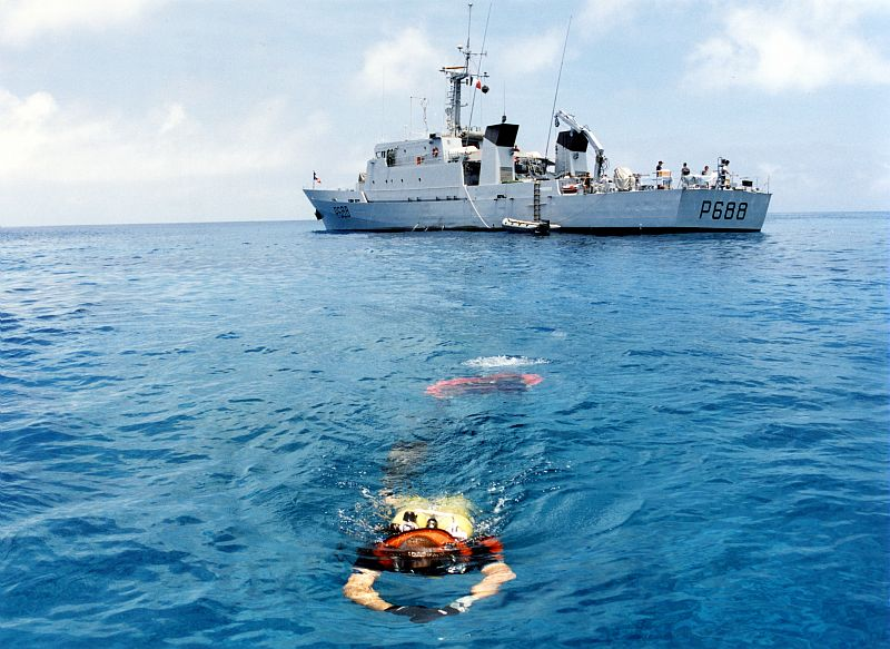 Un plongeur de bord avec le patrouilleur P400 La Moqueuse dans les eaux bleues du pacifiques